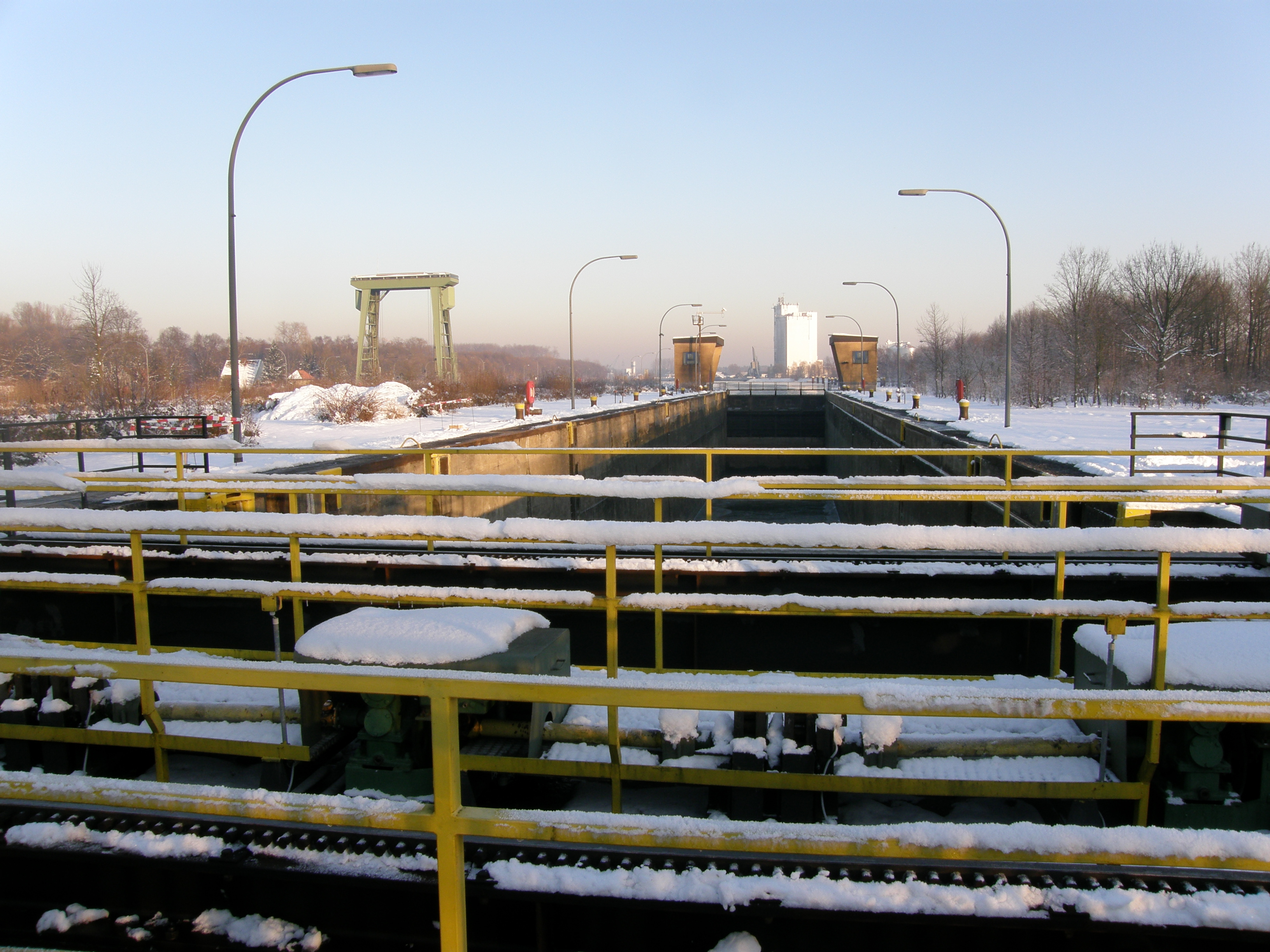 Schleuse Dorsten Kleine Schleuse